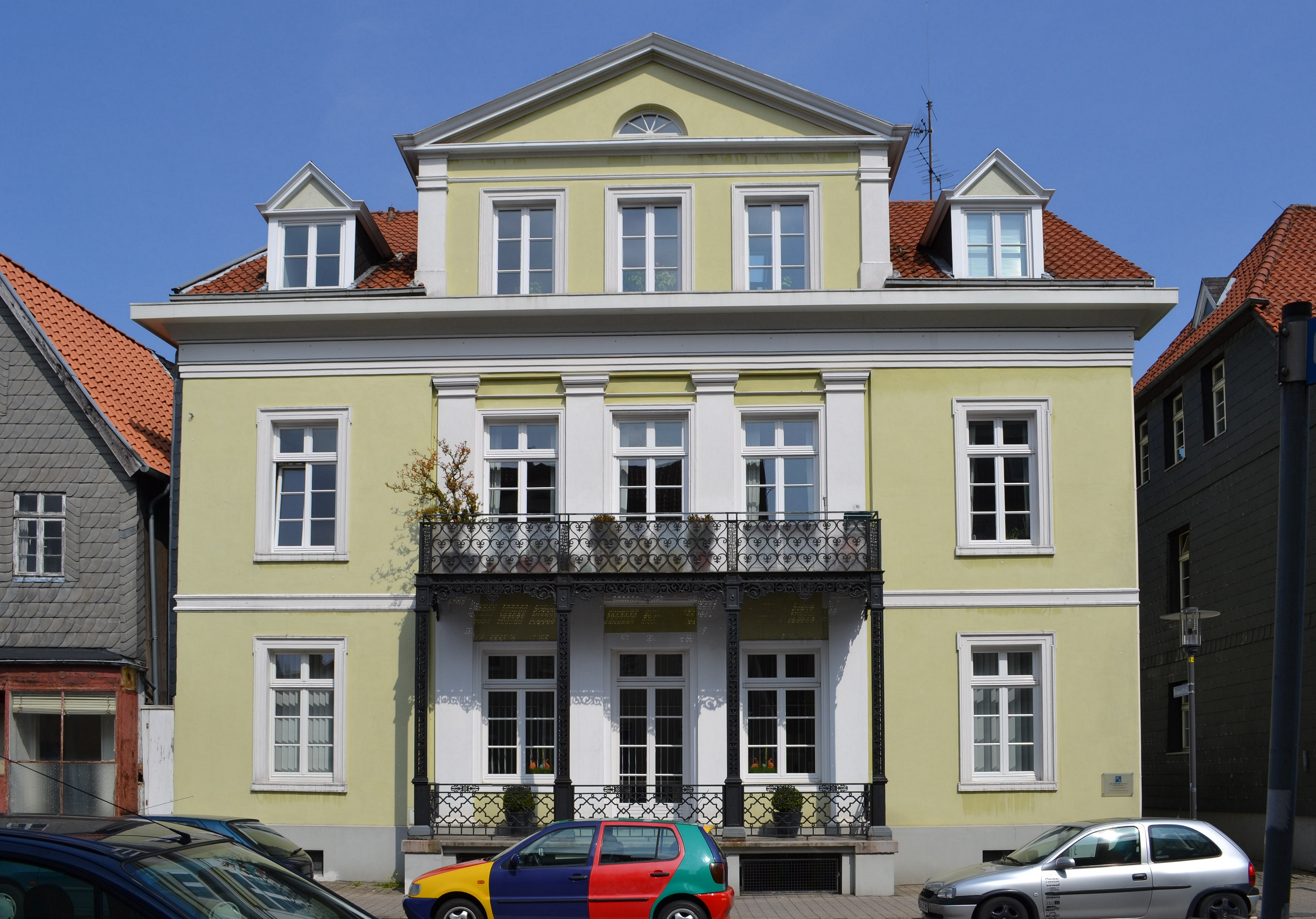 Baudenkmal Detmold Nr. 201 - klassizistisches Wohnhaus, ehemaliger Lippischer Landtag Grabenstraße 12 (Ansichtseite Exterstraße)